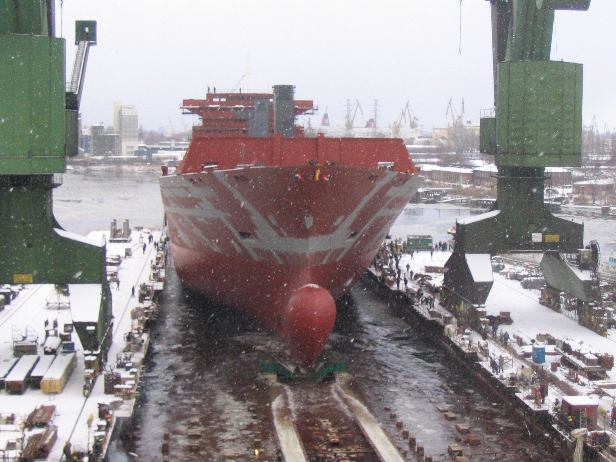 Wodowanie rufowe statku na wydziale PK3 Stoczni Gdańskiej, 28 lutego 2005, autor: Stanisław Kosiedowski.